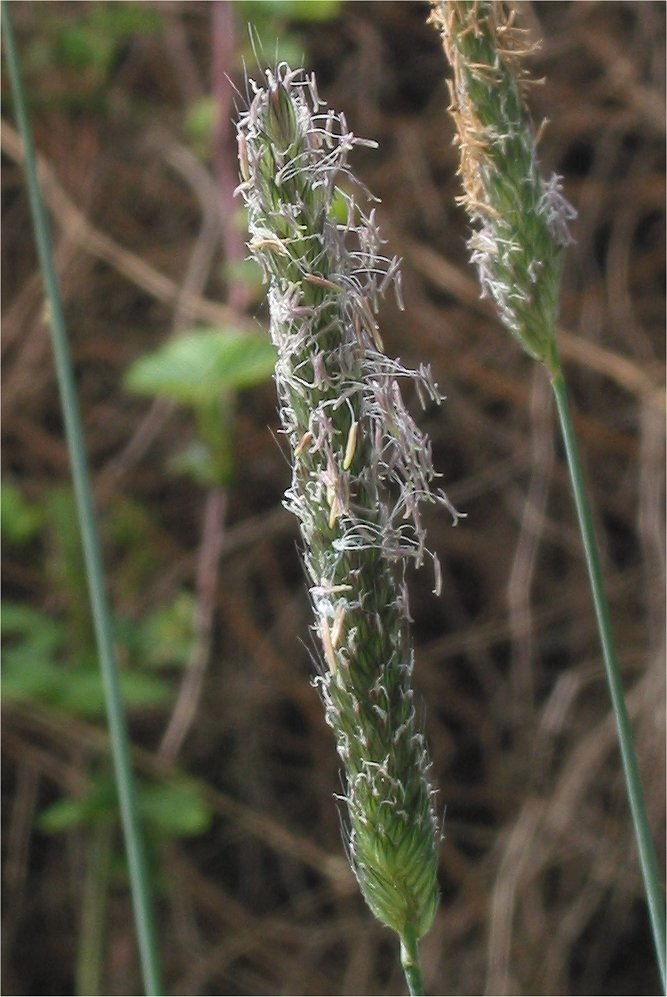 Alopecurus pratensis (Grote vossenstaart)